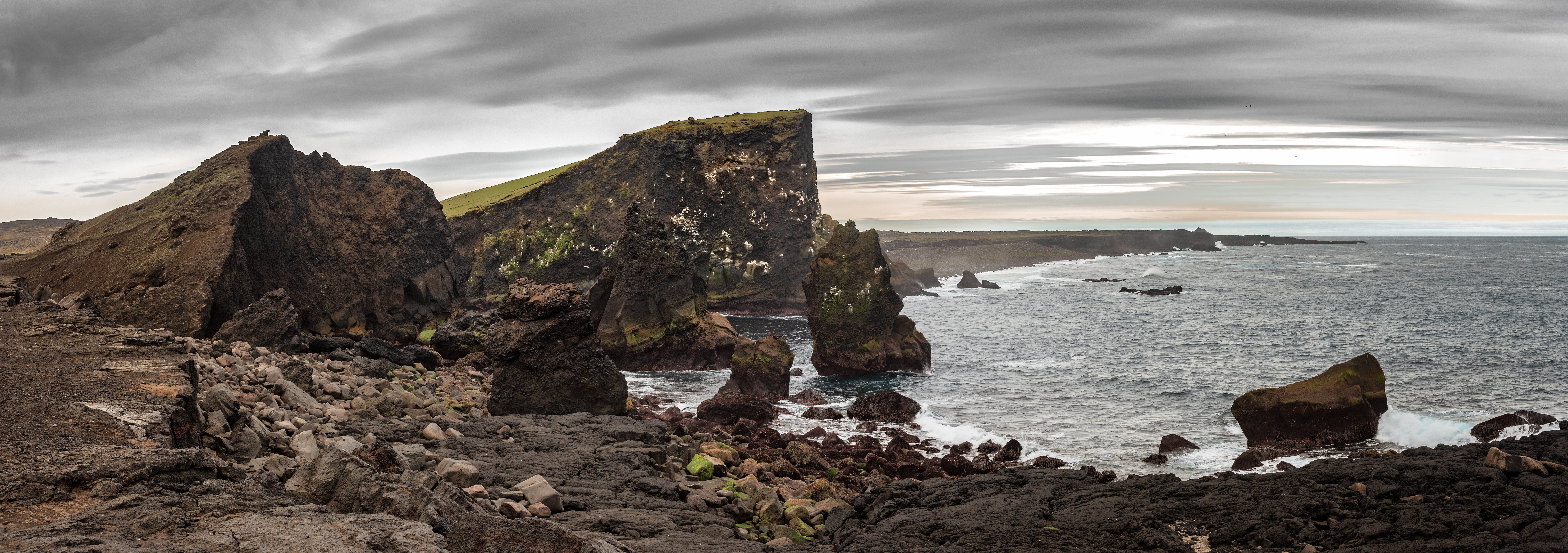 Valahnúkamöl, Iceland